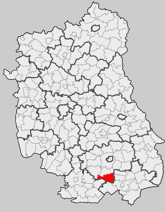 Map of gmina Krasnobród, Zamość county, Lublin voivodship Mapa gminy Krasnobród, powiat zamojski, województwo lubelskie